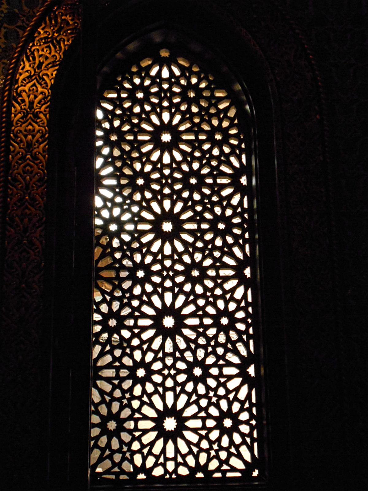 رونق وجمال التصميم